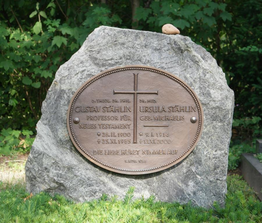 Grab des Theologen Gustav Stählin, 1900-1985, auf dem Hauptfriedhof Mainz